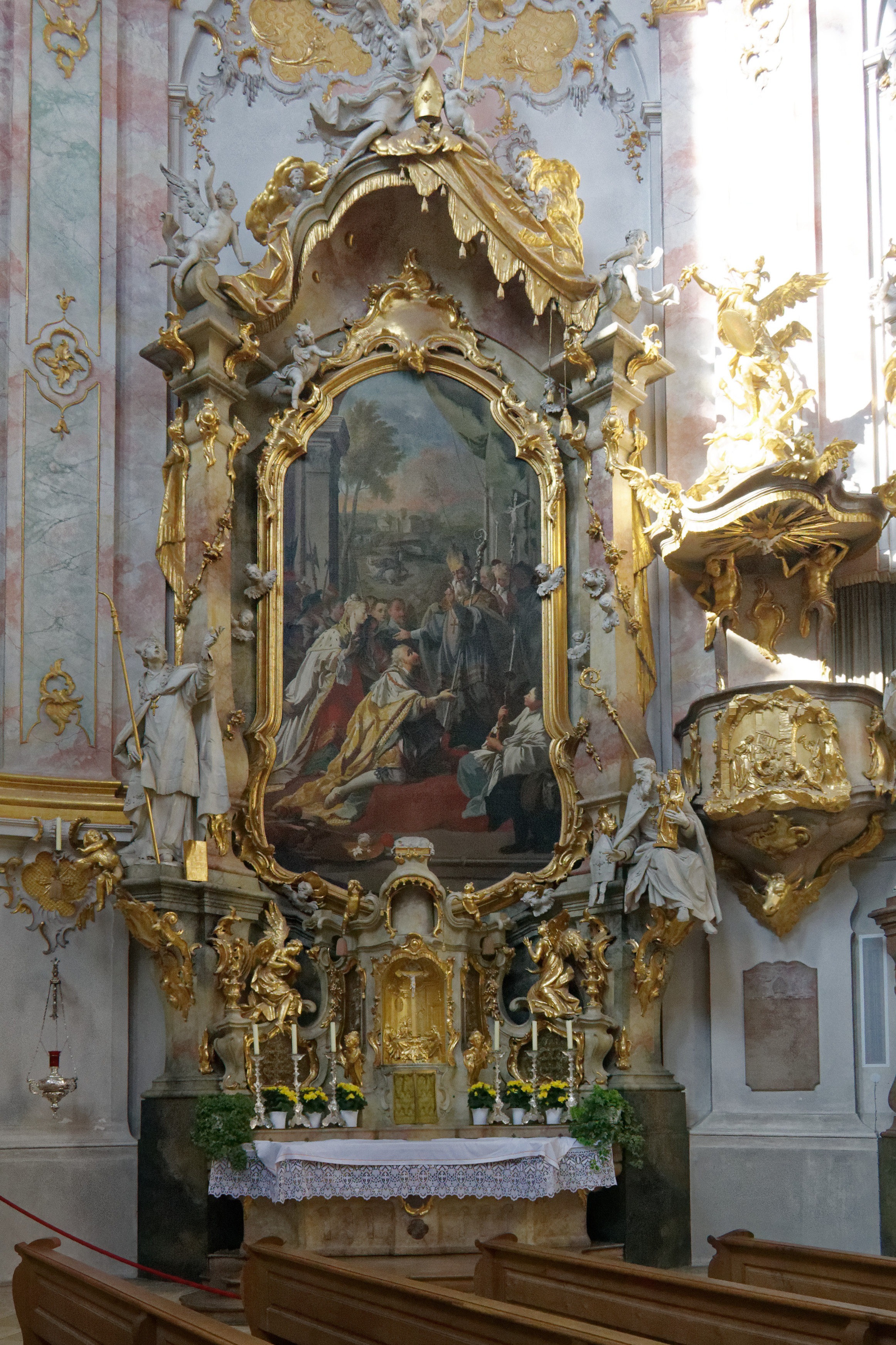 Seitenaltar in der Klosterkirche Ettal